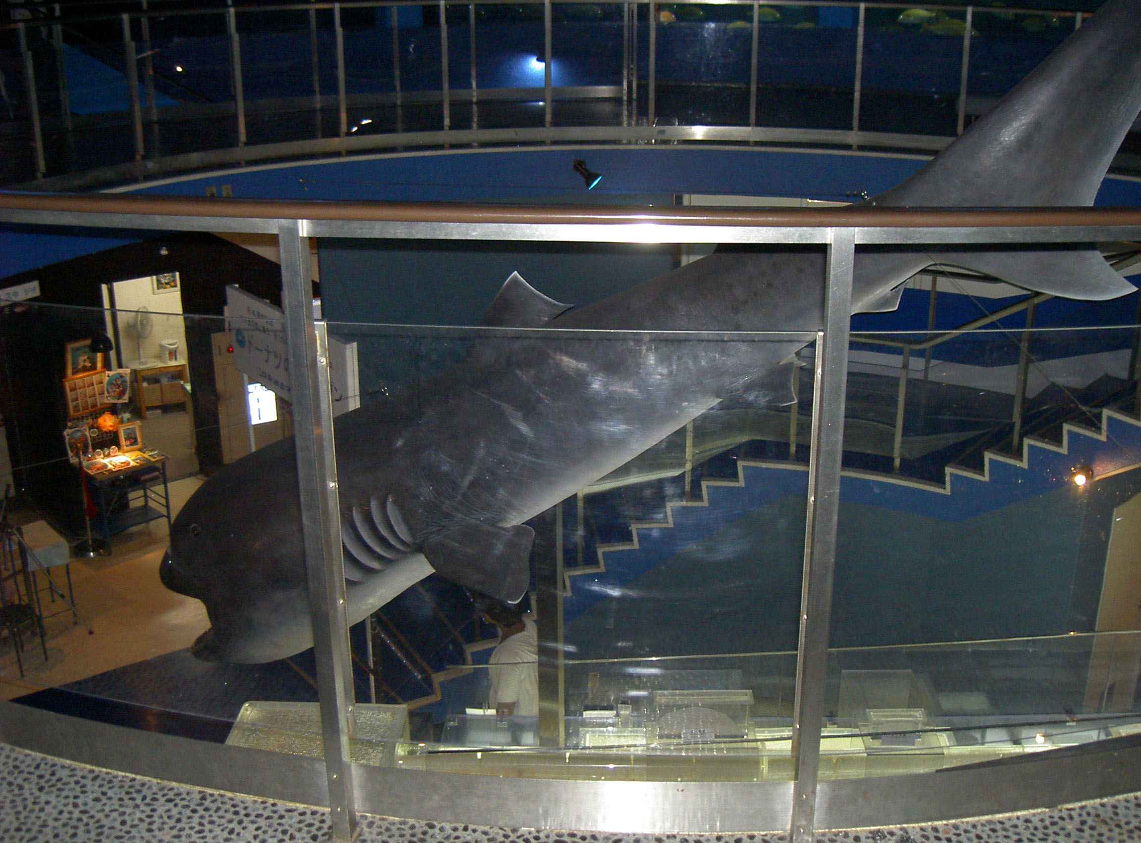 A specimen of megamouth Shark, Megachasma pelagios. At Keikyu Aburatsubo Marine Park, Kanagawa, Japan. ja: メガマウスの標本。京急油壺マリンパークにて撮影